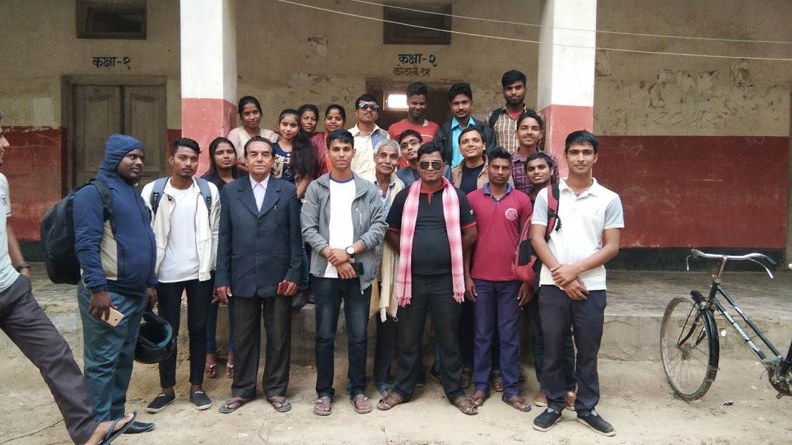 नेपाली: समूहमा